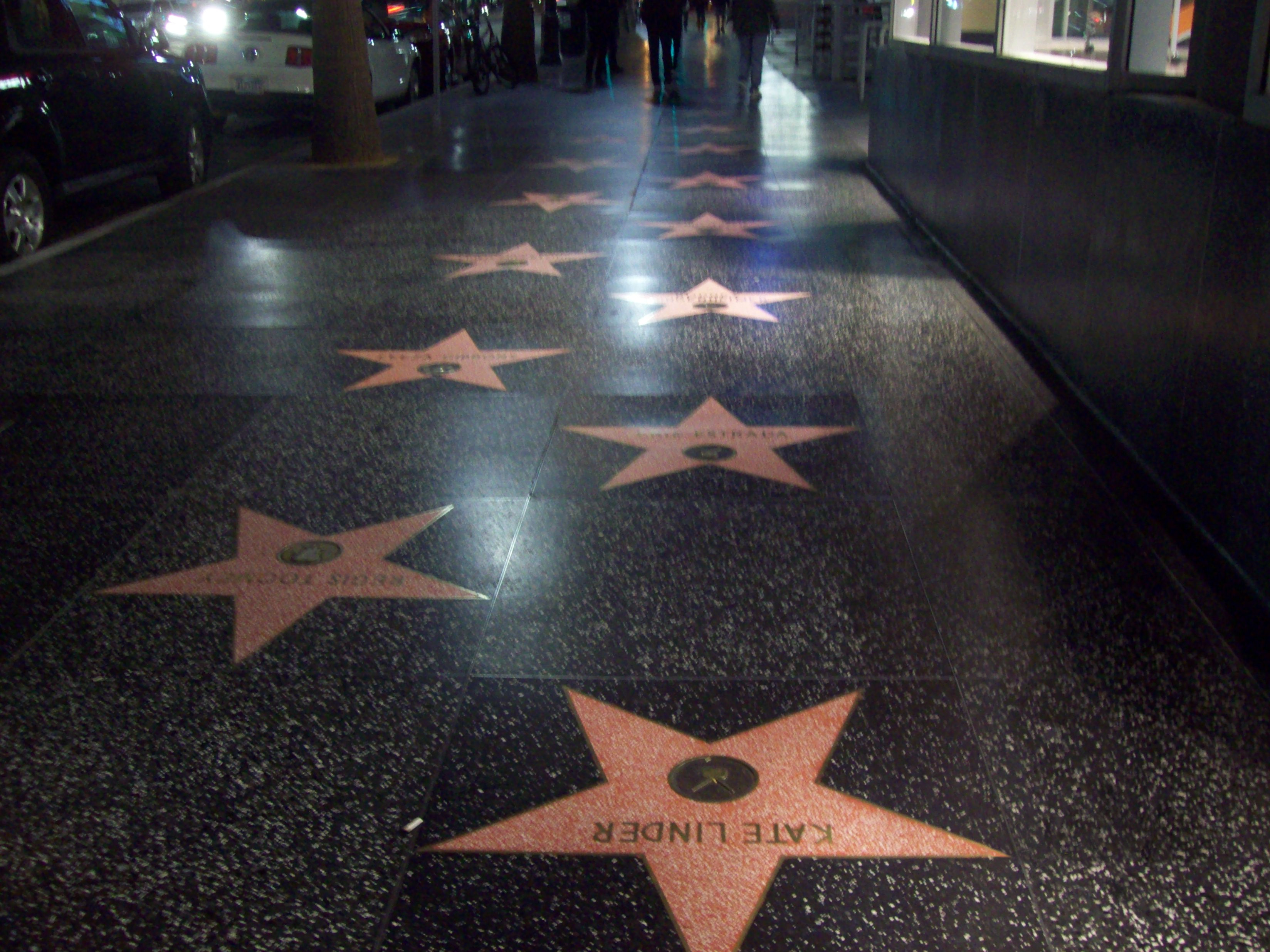 Paseo de la Fama de Hollywood de Noche